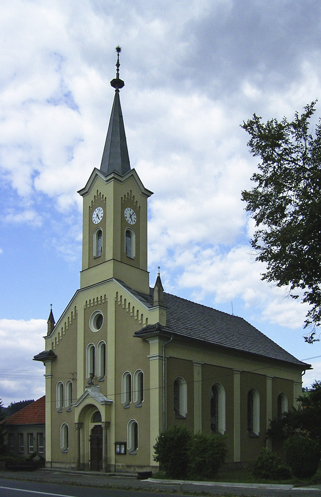 Evangelický kostel v Jablůnce, okres Vsetín